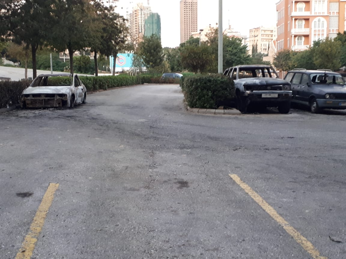 Ausgebrannnte Autowracks in der Innenstadt von Beirut nach den Attacken der Hisbollah- und Amal-Anhänger während der Proteste im Libanon